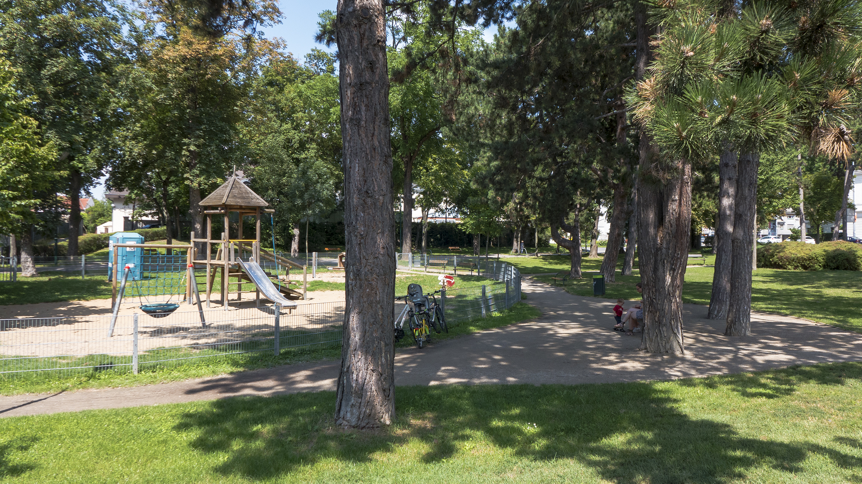 Astrid-Lindgren-Park in Wien 22